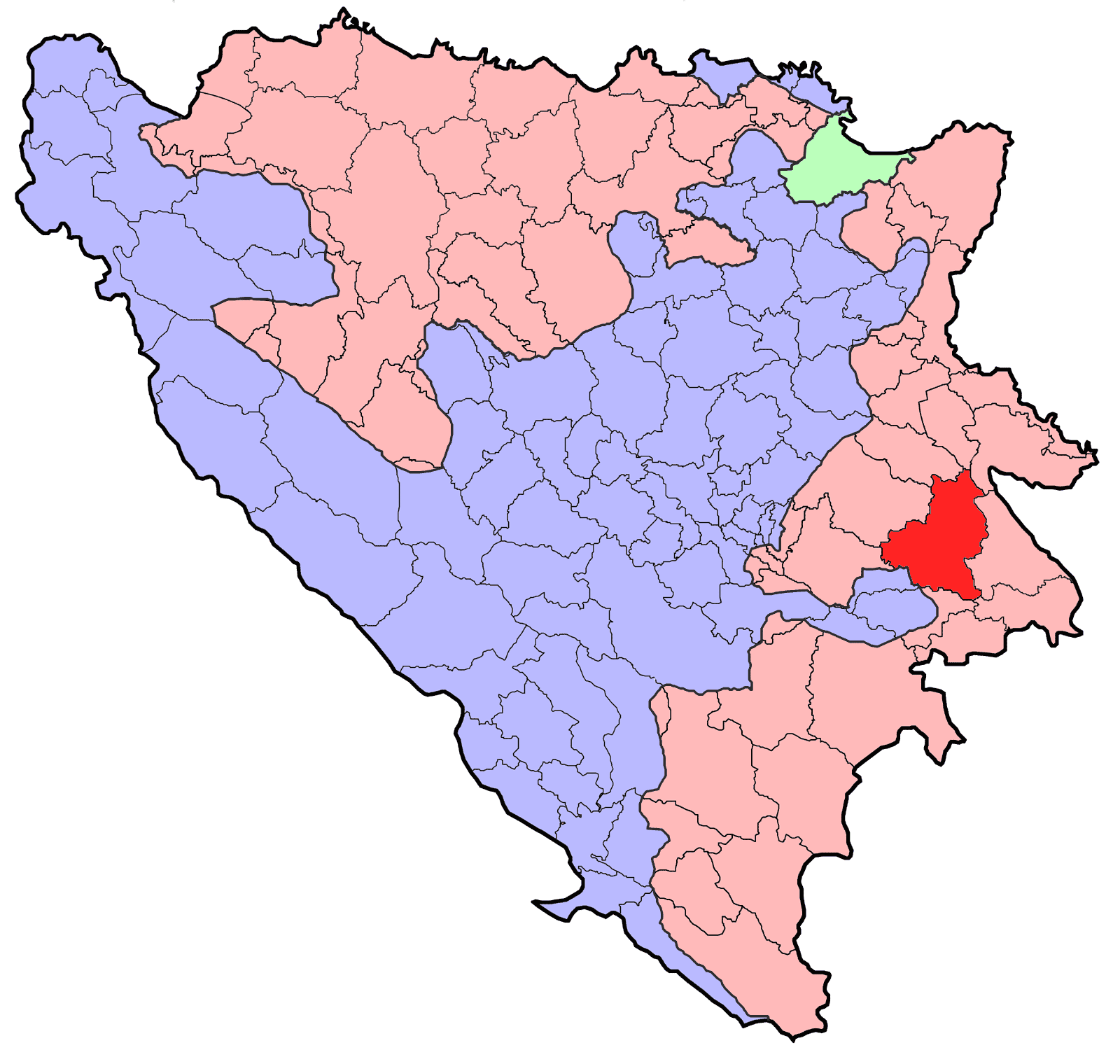 Republika Srpska (BiH) municipality